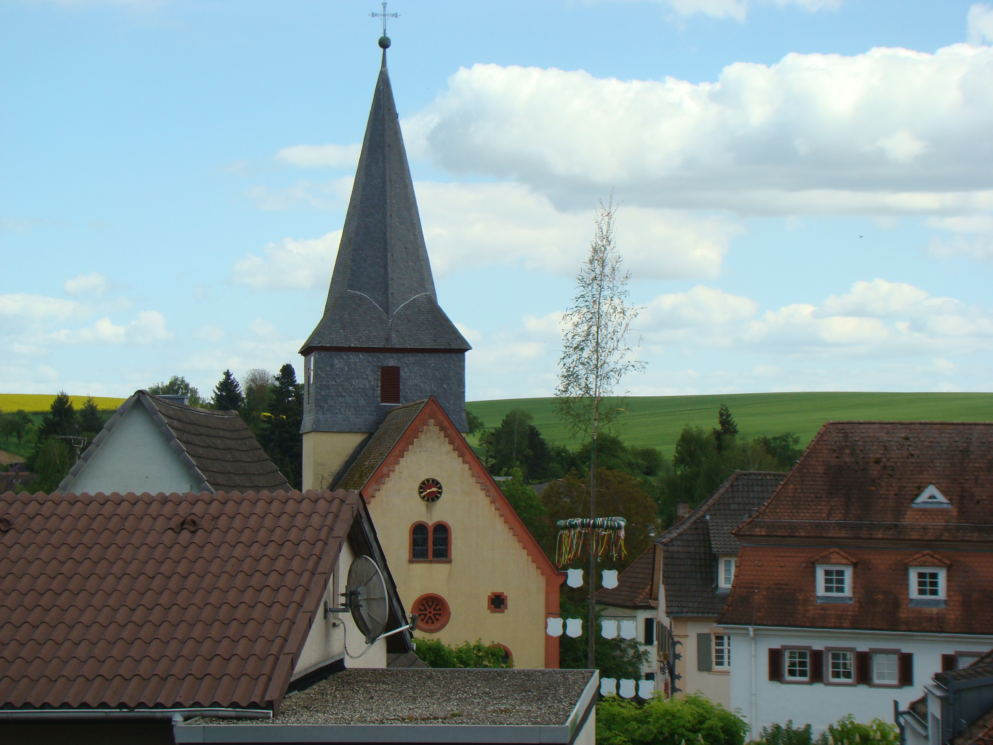 Helmstadt-Bargen, Ortsteil Helmstadt